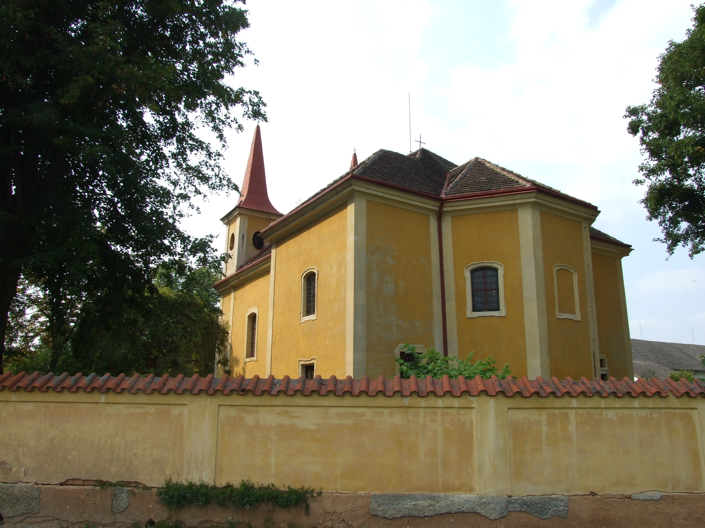 Kostel Nanebevzetí P. Marie (Osek), Osek, okres Rokycany